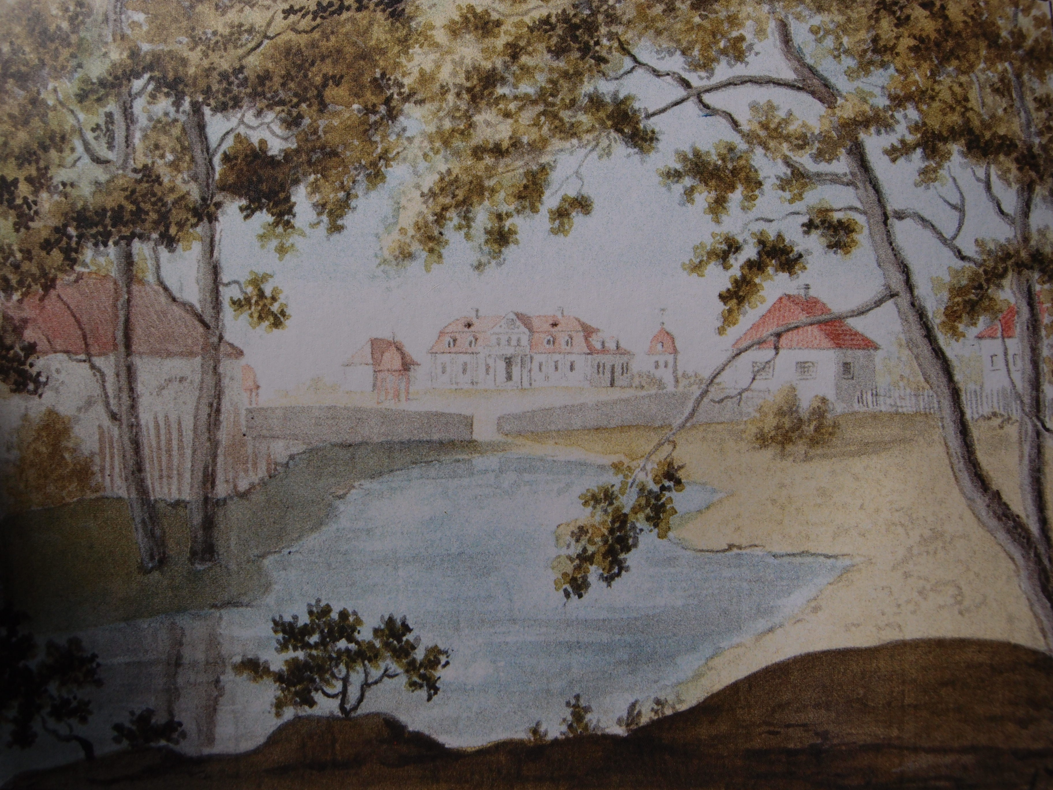 Gutsensemble Orellen in Livland (heute: Ungurmuiža, Bezirk Pārgauja, Lettland) Datum: 1794 Urheber: Johann Christoph Brotze Quelle: "Gutshof unter den Eichen", Katalog der Ausstellung im Schlossmuseum Rundale und im Herder-Institut Marburg, 1998